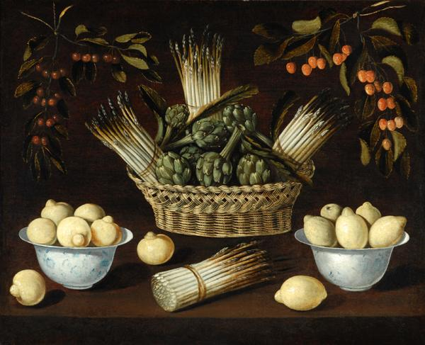 Bodegón de espárragos, alachofas, limones y cerezas.